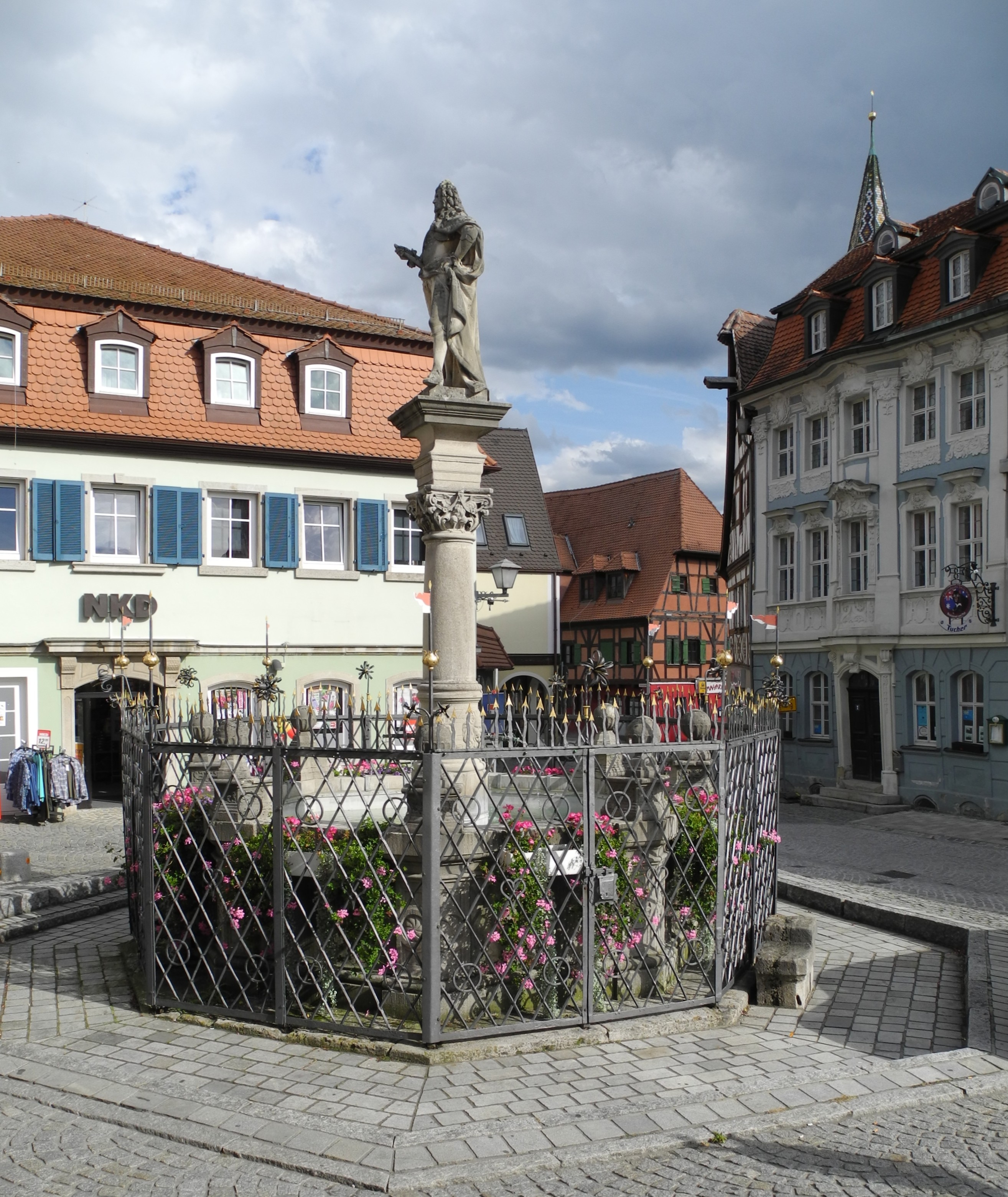 Bad Windsheim - Brunnen am Weinmarkt